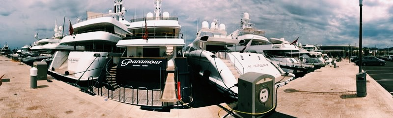 Panorama van de haven van Cannes.